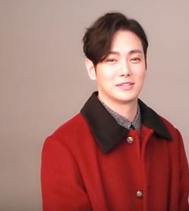 씬플레이빌 2월호의 커버는 10주년 기념공연으로 돌아온 뮤지컬 '잭더리퍼'의 다니엘 역을 맡은 배우 정동하, 환희와 함께했습니다.